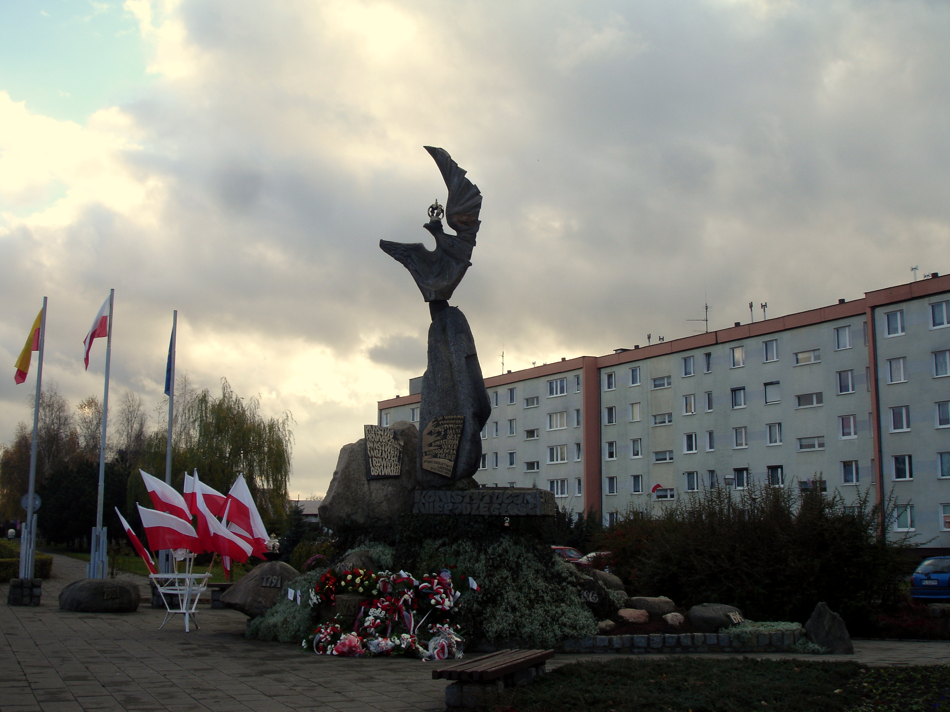 Pomnik 200-lecia Konstytucji 3 Maja i Odzyskania Niepodległości w Lesznie, widok na stronę z tablicami w dniu świeta 11 listopada